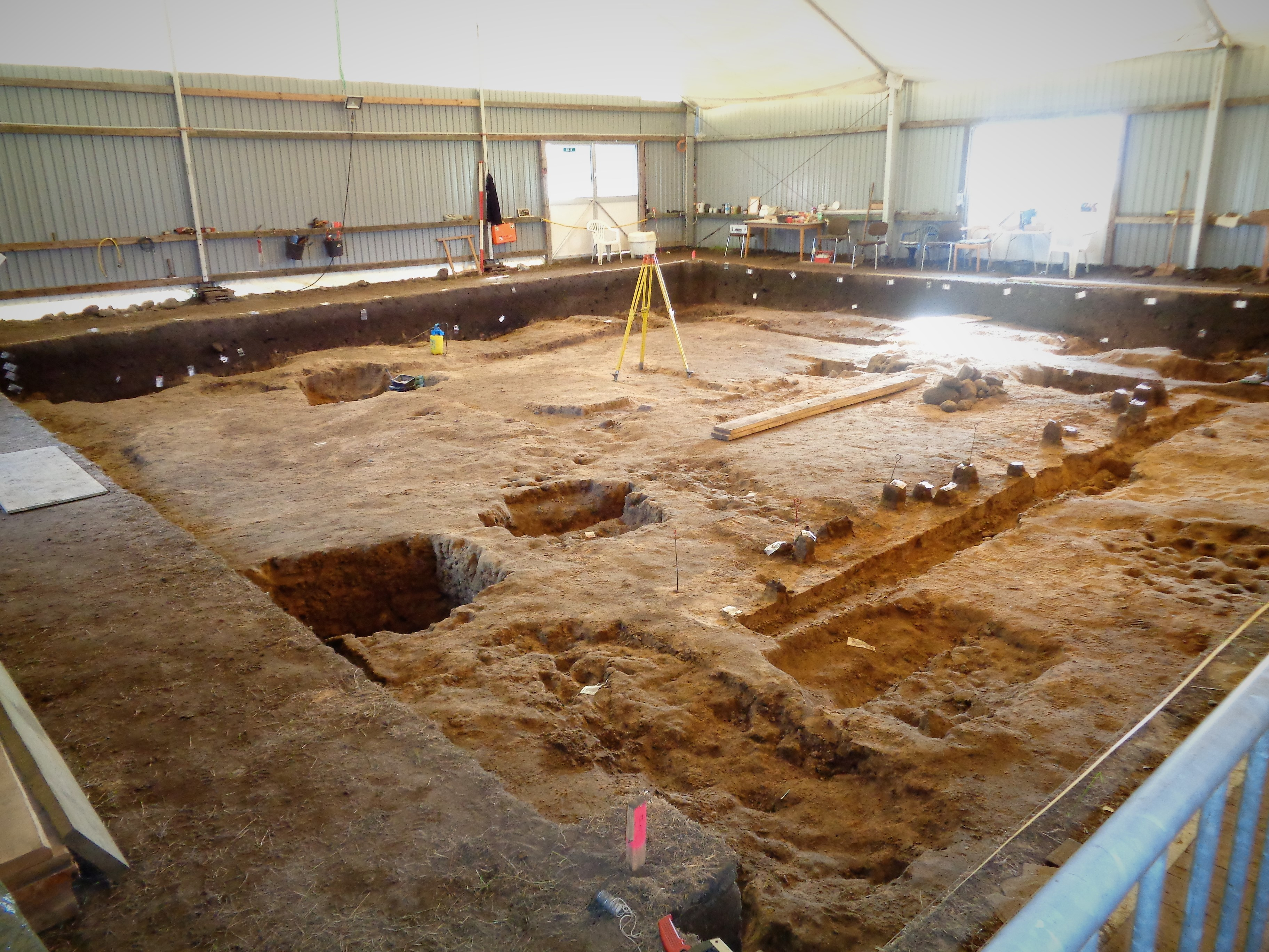 Ausgrabungsstelle nahe der Wikingersiedlung Haithabu.